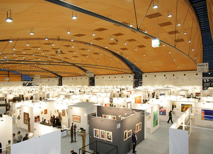 art KARLSRUHE